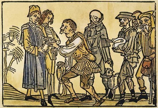 Feudalismo